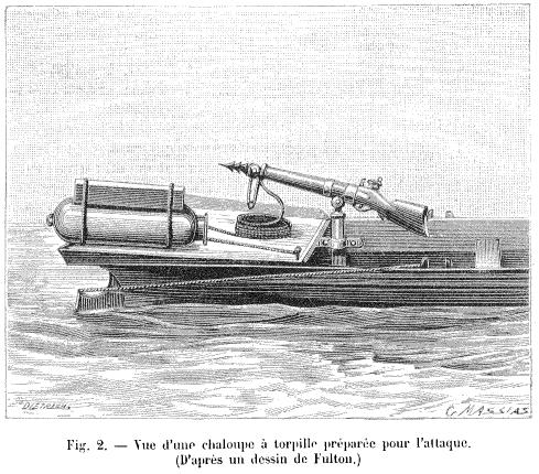 Torpille reliée à un lance harpon vers 1820